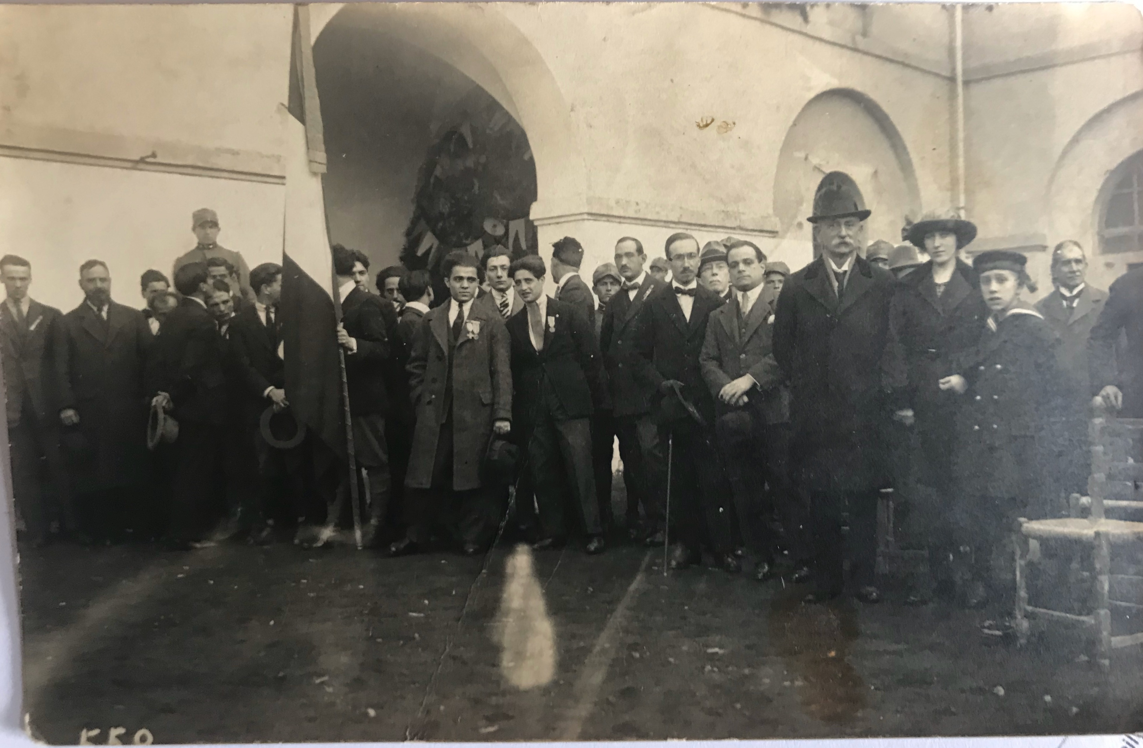 Nel cortile della caserma a Firenze 26/10/1921